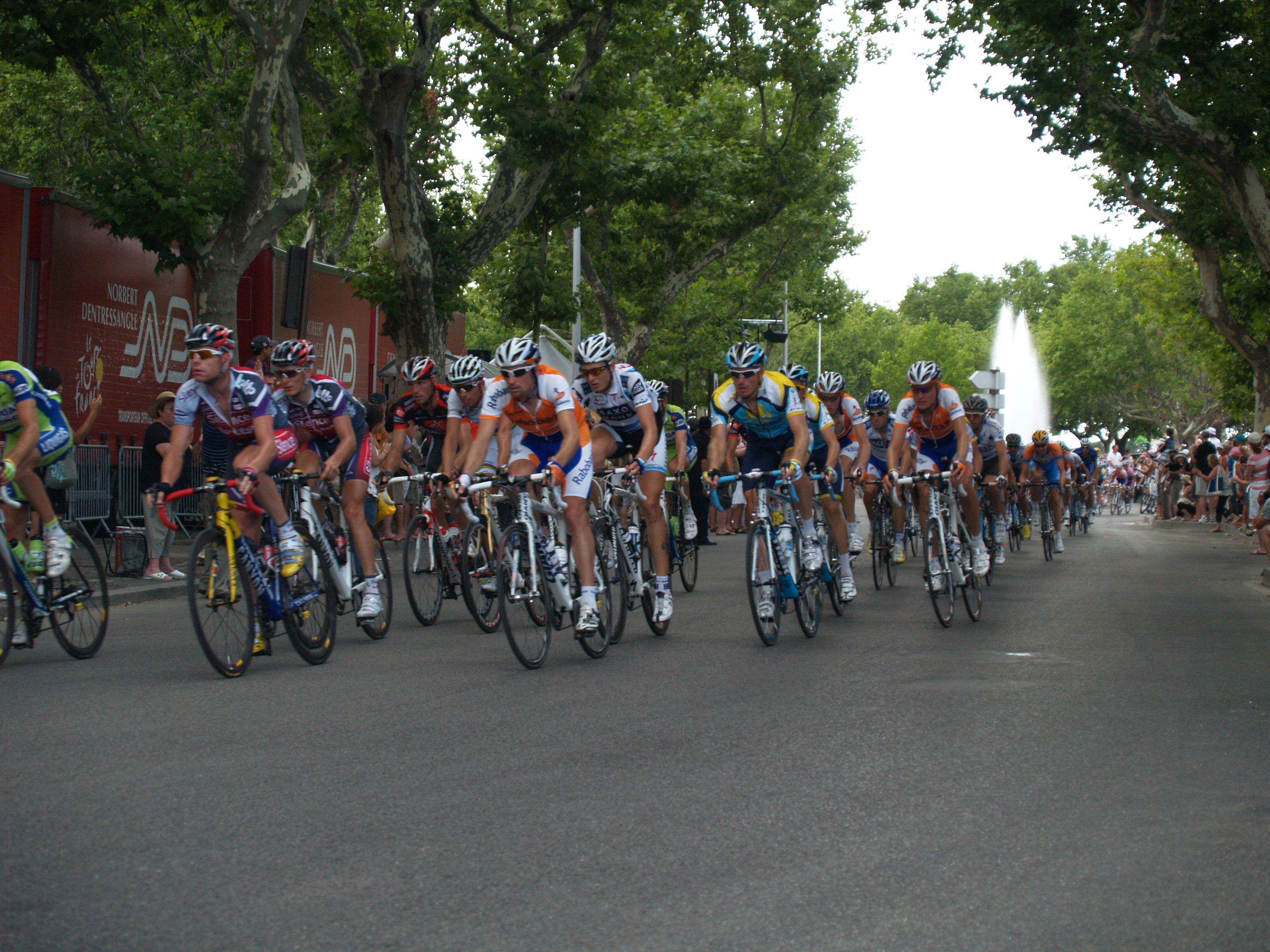 Peloton du Tour de France 2009 en Arles.